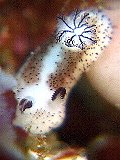 Jorunna parva, Japón